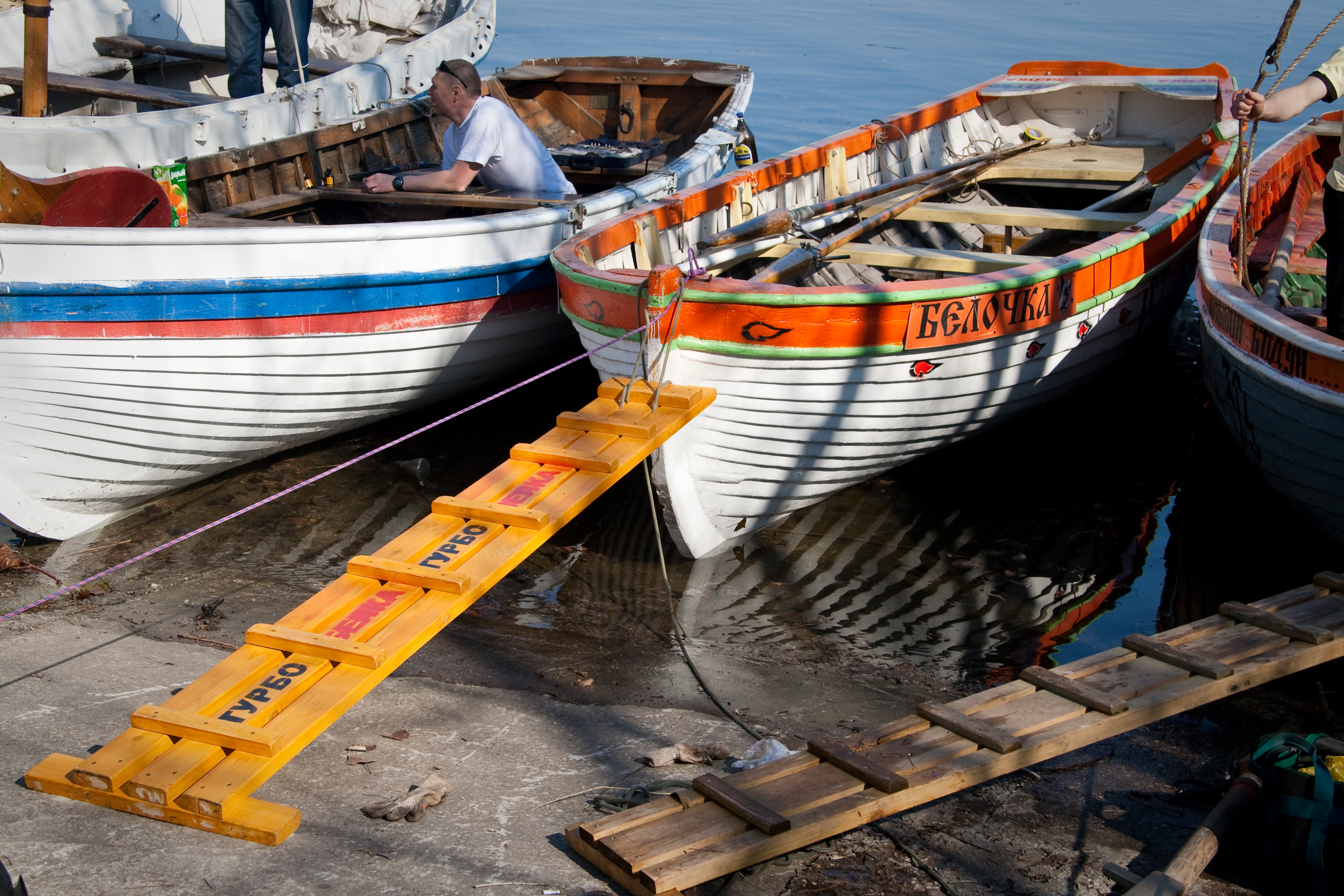 43-я Жигулёвская кругосветка